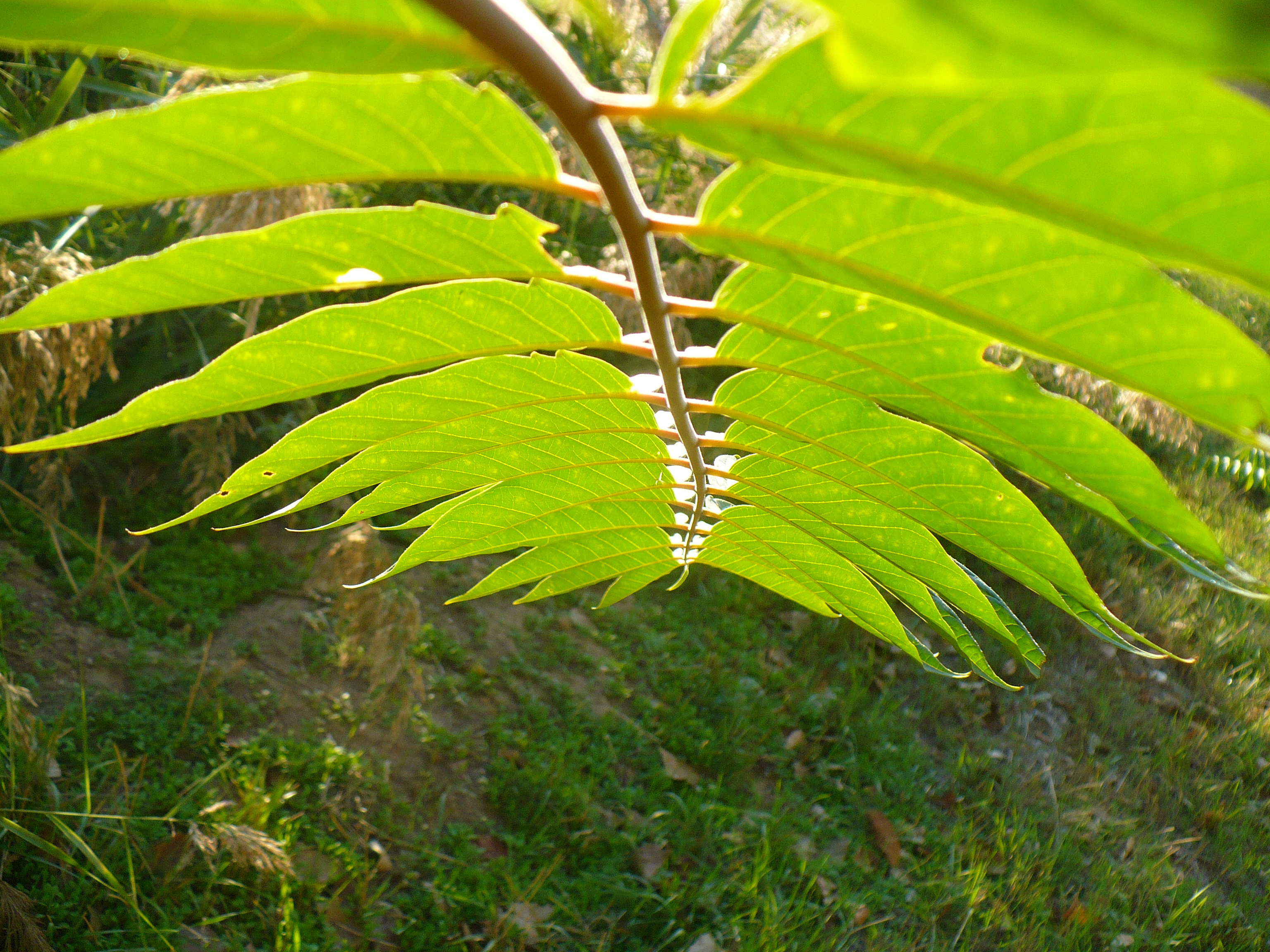 Bahçede değişik bitkilerden görüntüler